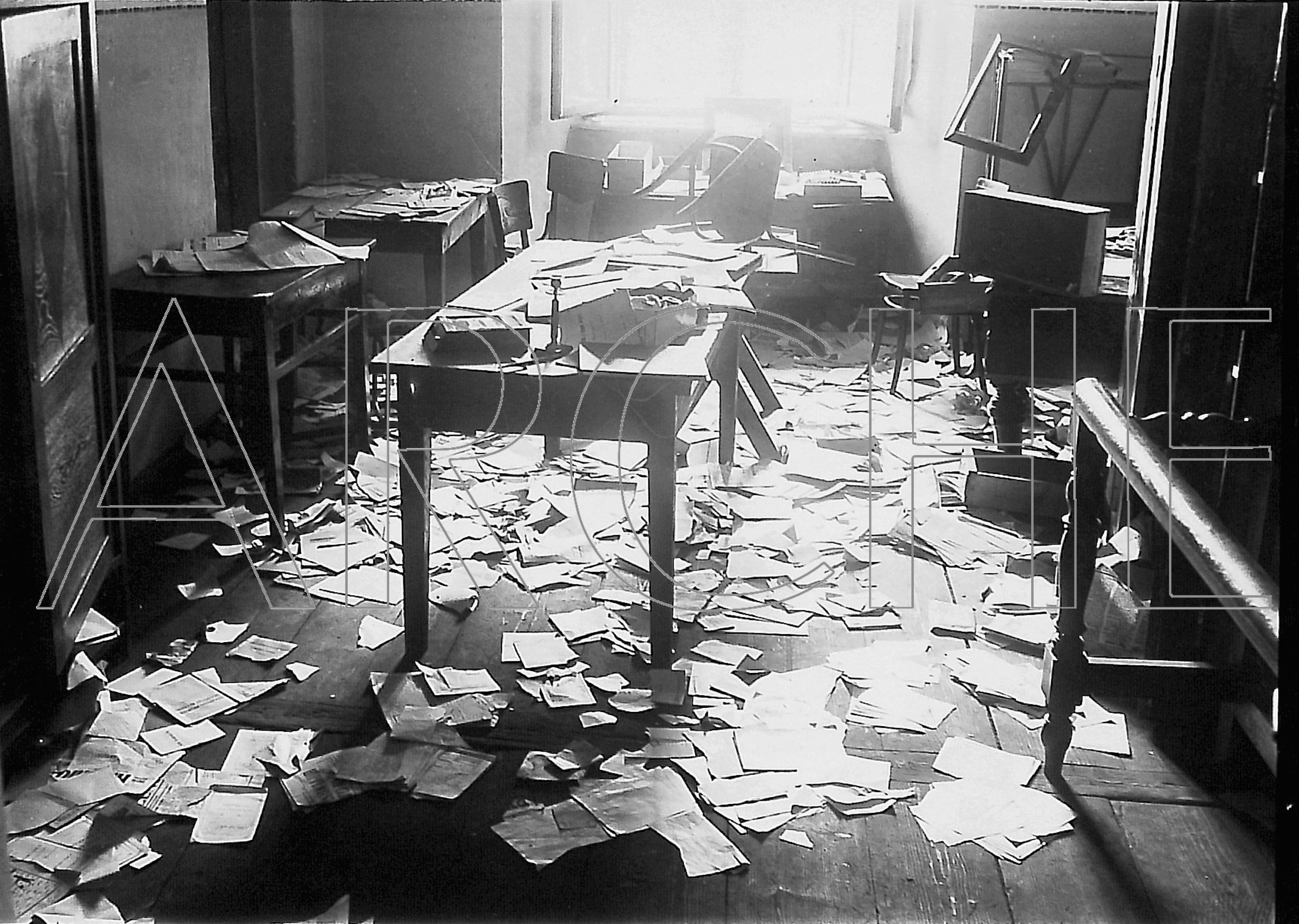 Рэдакцыя «Нашай Нівы» пасля паліцэйскага ператрусу. Фота 1910-х гг. З фондаў БДАМЛМ